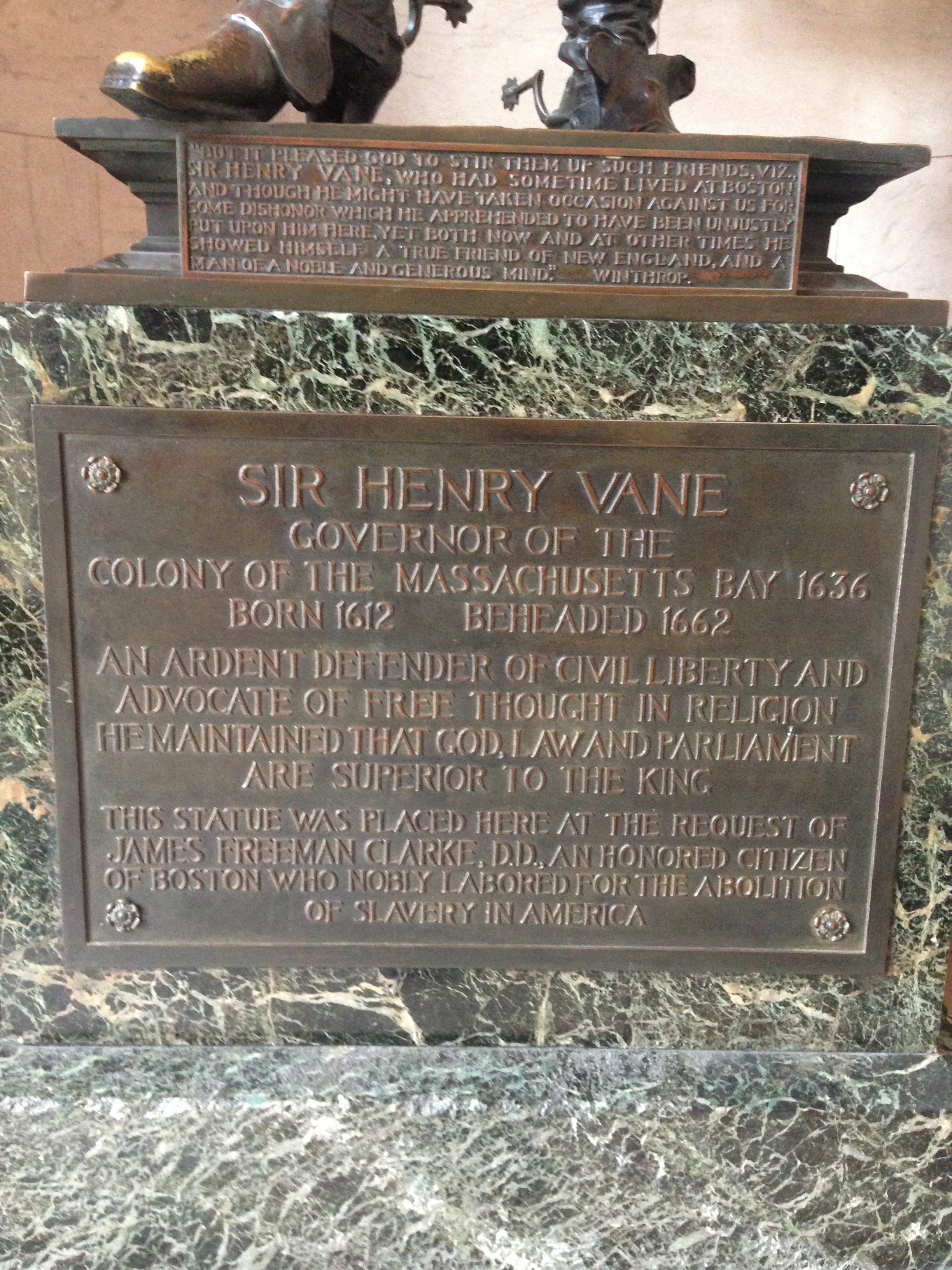 sir Henry vane